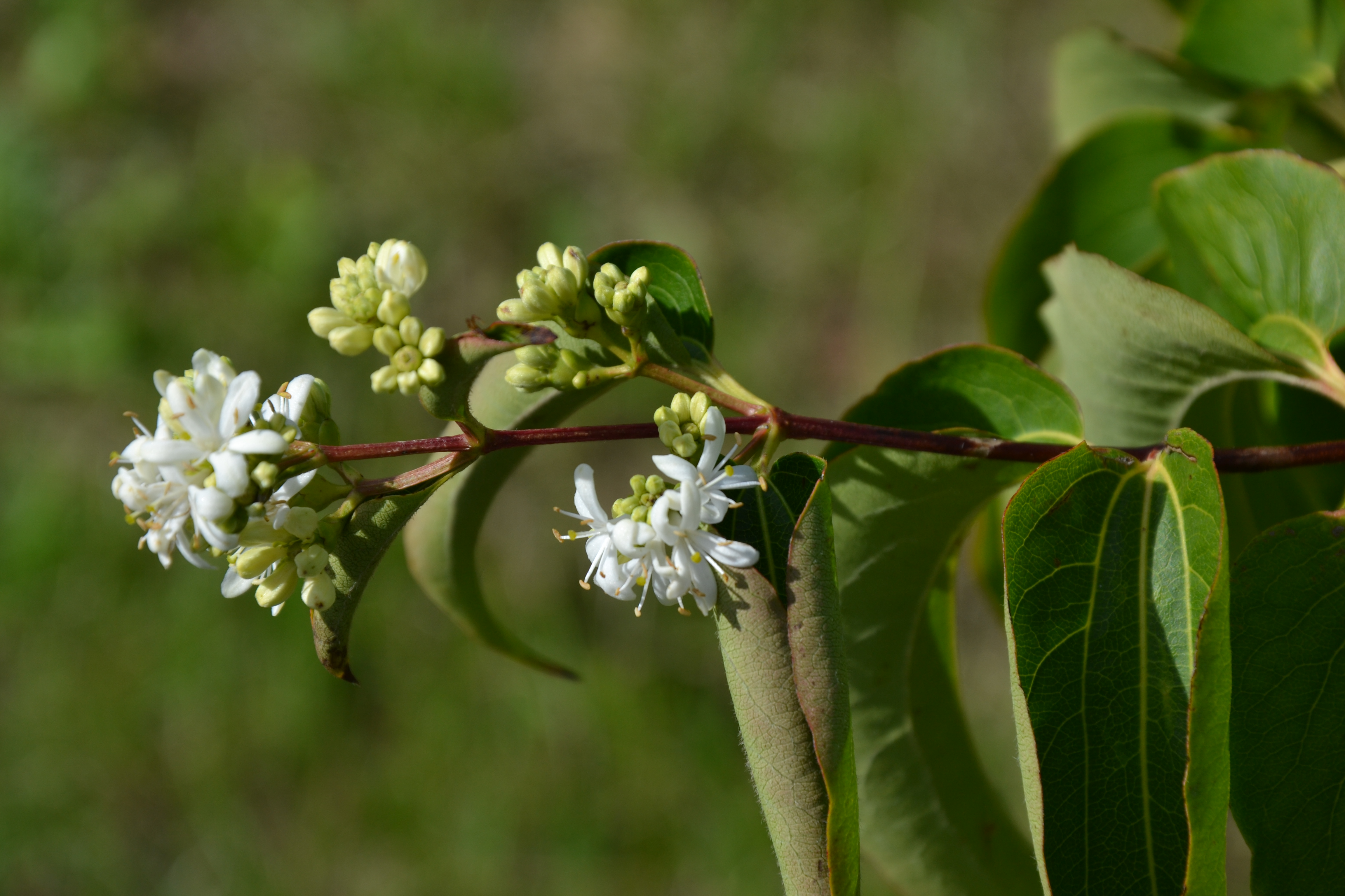 Heptakodium chińskie